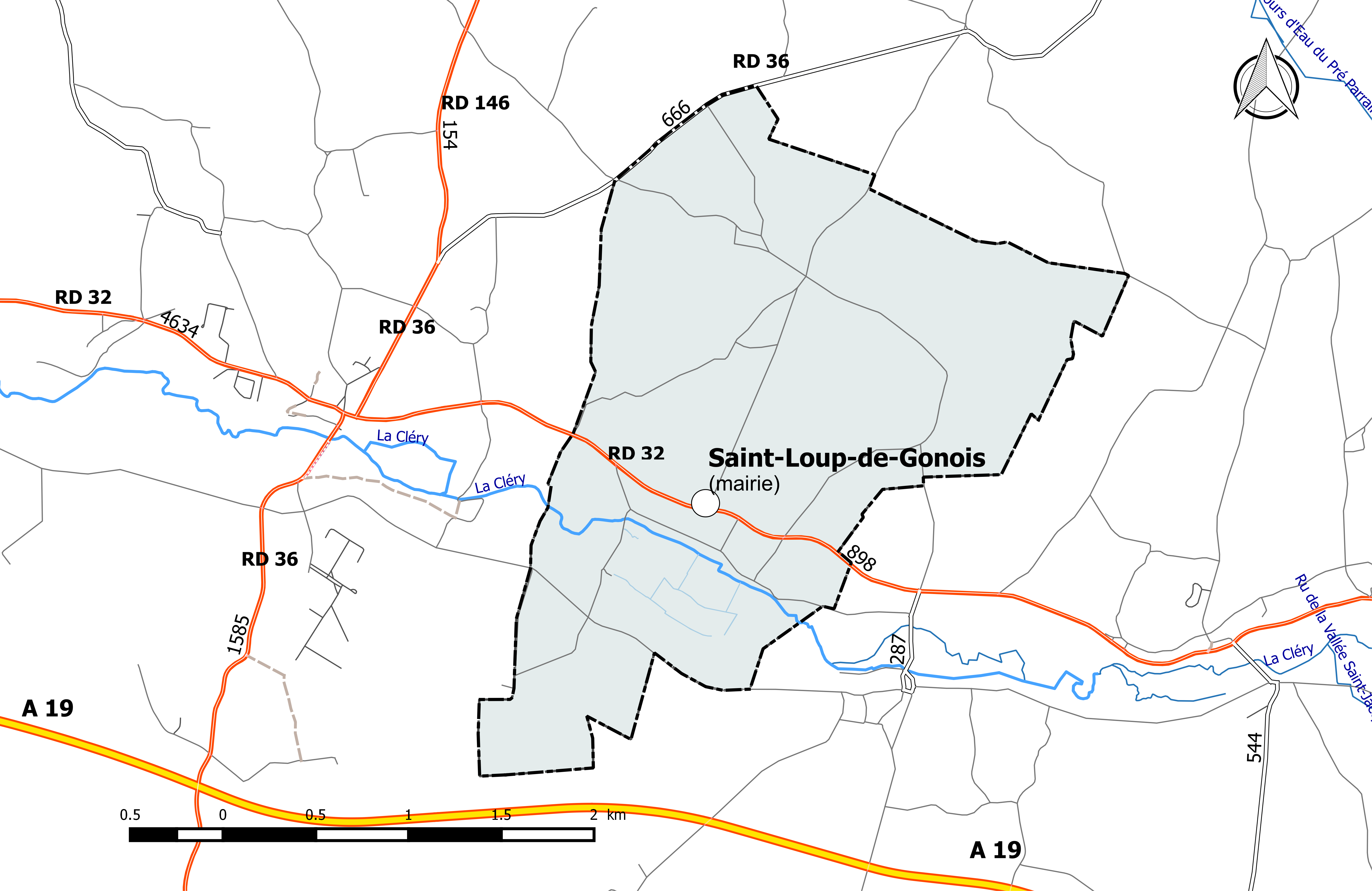 Carte du réseau routier de la commune de Saint-Loup-de-Gonois.